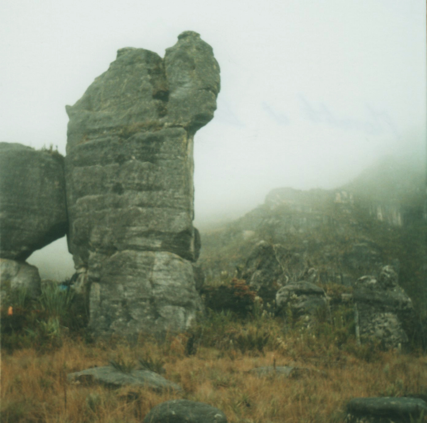 esta es una de las muchas piedras en formas curiosas del cerro condorpuna.